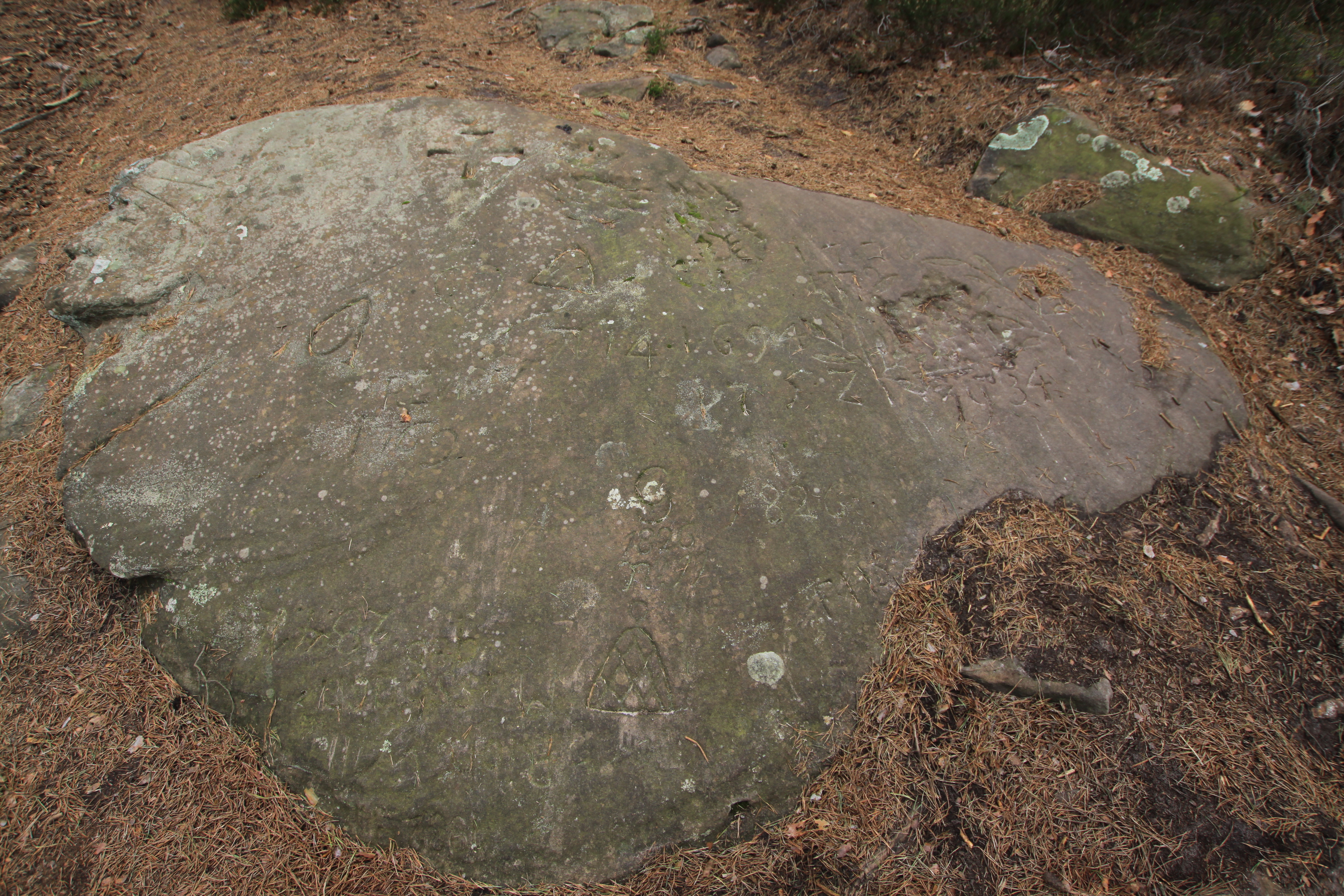 Der Kaffenstein ist ein Loogfelsen und befindet sich südlich des Stabenbergs oberhalb des Forsthauses Benjental.